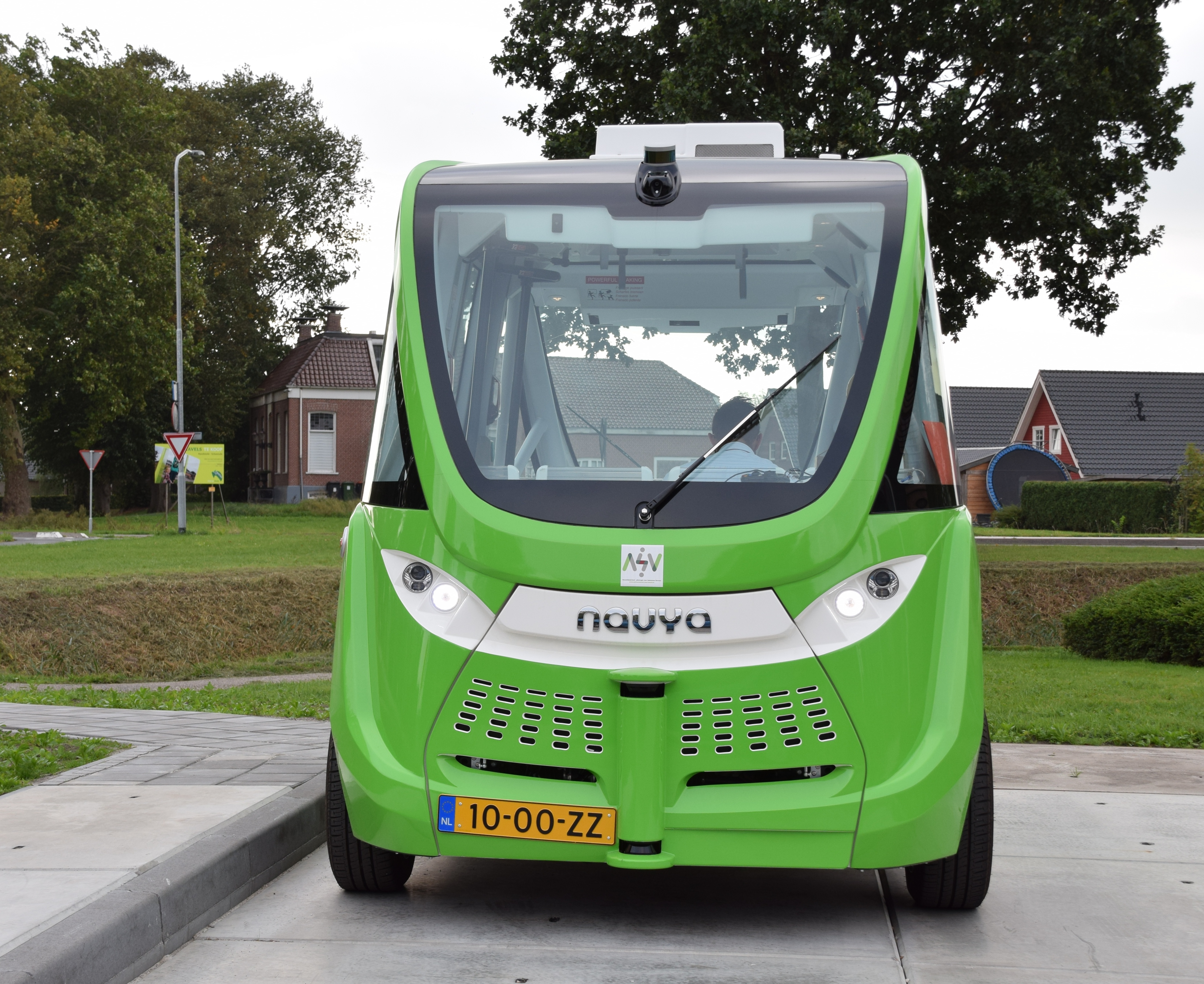 Zelfrijdende bus bij het Ommelander Ziekenhuis Groningen in Scheemda met ZZ kentekenplaat